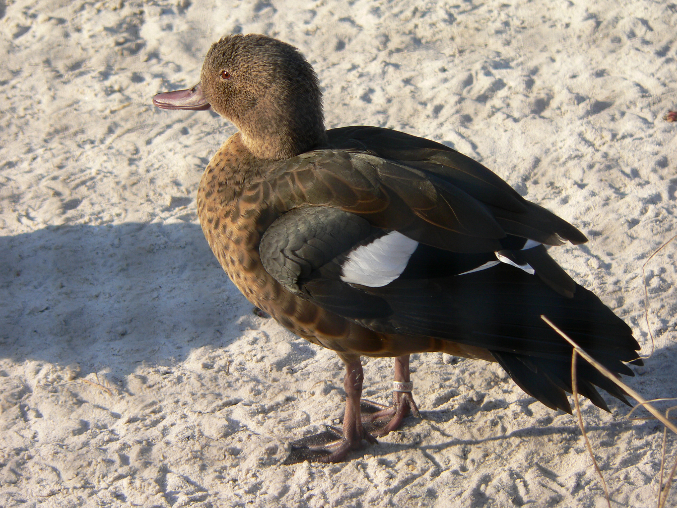 Bernierente